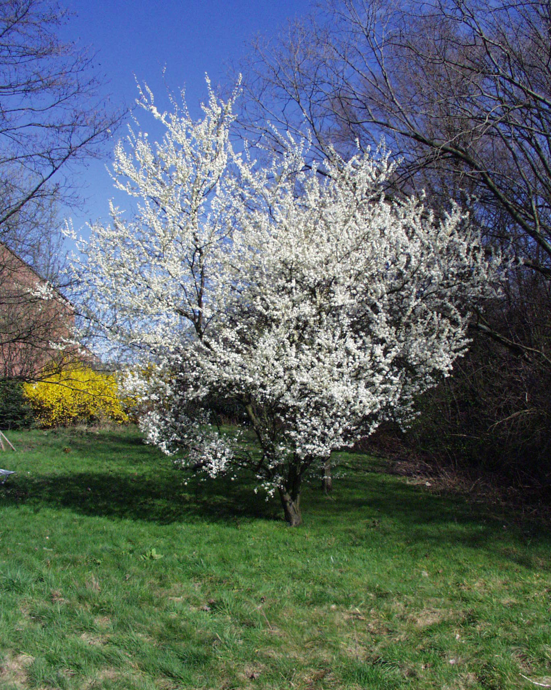 Mirabellenbaum in Blüte